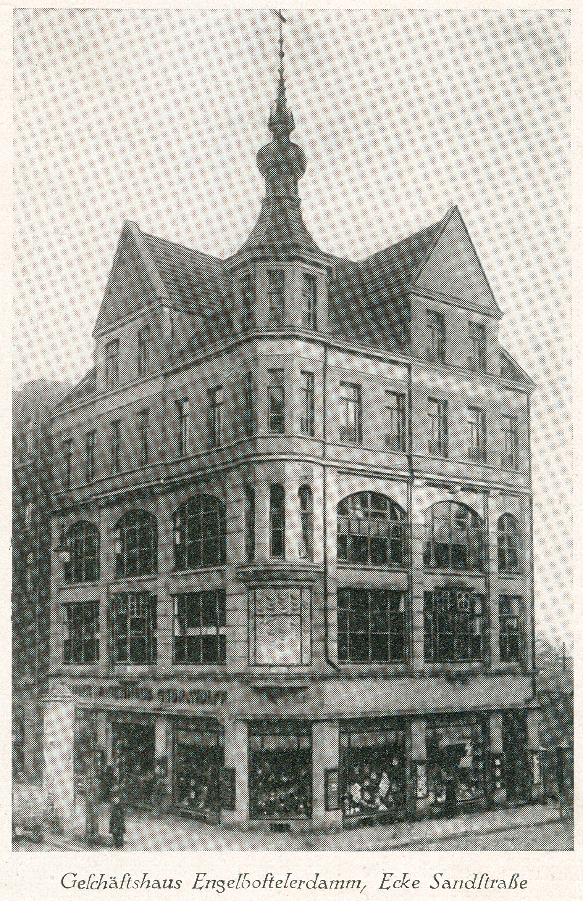 Punktgerasteter Abdruck einer Fotografie des ab 1901 errichteten Berliner Warenhauses Gebrüder Wolff am Engelbosteler Damm 38 Ecke Sandstraße in der Nordstadt von Hannover ...